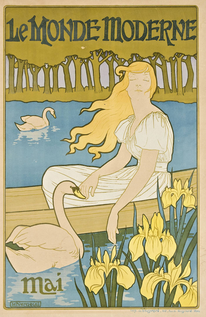 Le Monde moderne : mai, lithographic poster designed by Maurice Pillard Verneuil, printed in Paris by L'Imprimerie de Vaugirard.